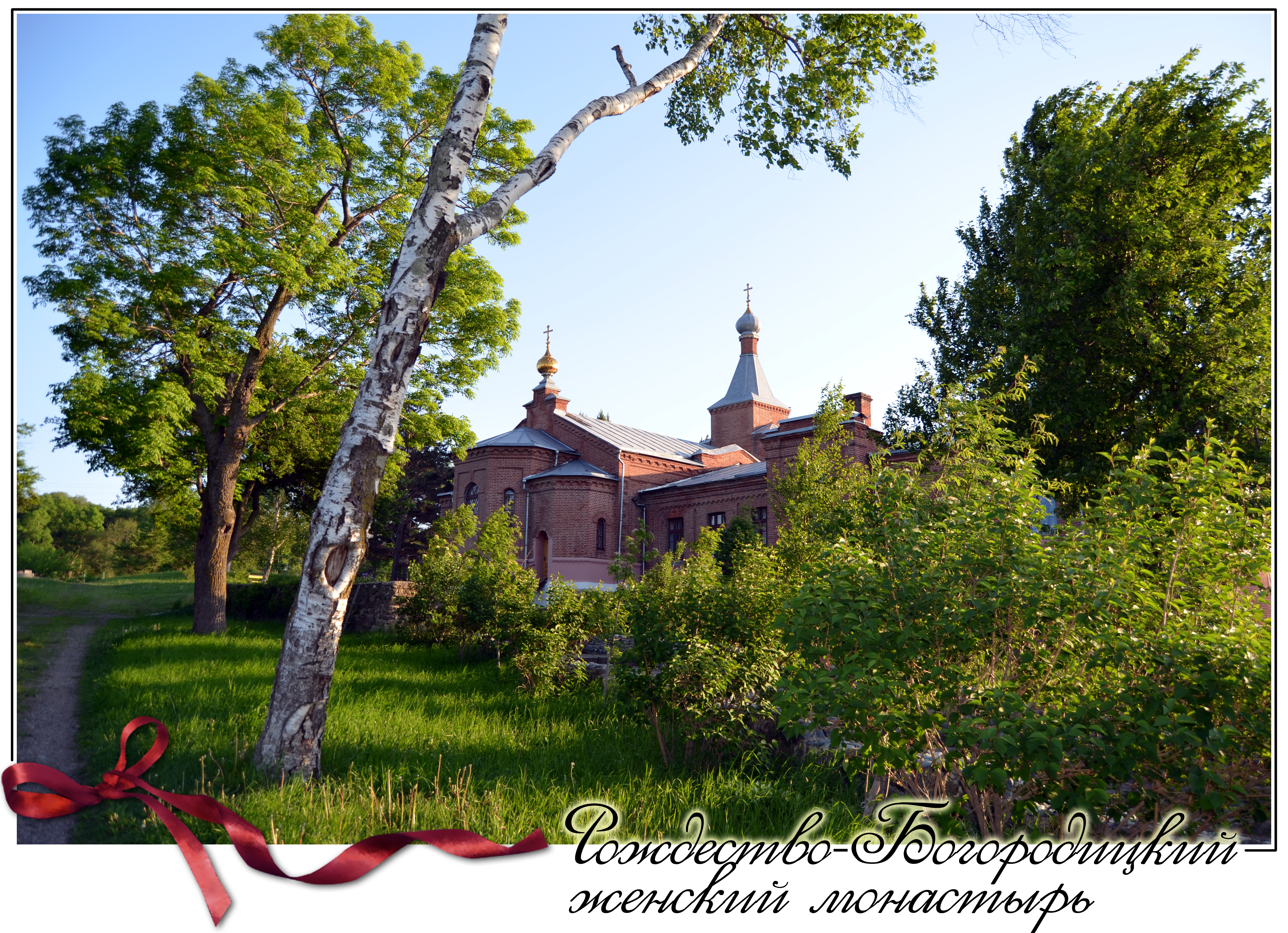 Южно-Уссурийский Рождество-Богородицкий женский монастыть. Фото 2014 г.